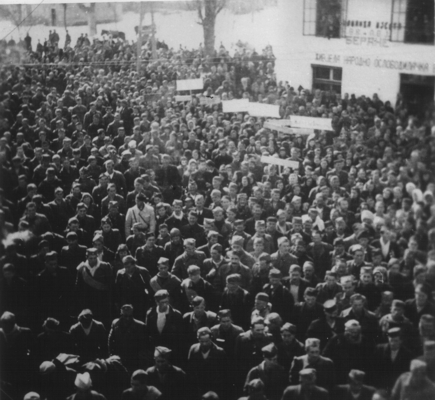 Srpskohrvatski / српскохрватски: Veliki narodni zbor povodom osnivanja Osme crnogorske brigade u Beranama, 25. februara 1944.